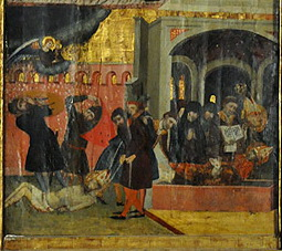 Retaule de Sant Marc i Sant Anià, obra d'Arnau Bassa (1346). Actualment a la Seu de Manresa. Taula de l'enterrament de Sant Marc, al pis central del carrer dret